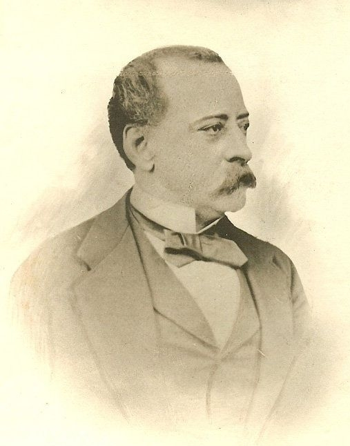 Santiago Mariano del Carmen Arcos Arlegui (Santiago de Chile, 25 de julio de 1822 - París, 23 de septiembre de 1874) fue un político liberal y ensayista chileno. Junto a Francisco Bilbao fue fundador de la Sociedad de la Igualdad, inspirada en el ideario de la revolución francesa de 1848, que buscaba la abolición en Chile de la República Autoritaria de carácter conservador y el establecimiento de un sistema basado en los principios de soberanía popular y fraternidad.